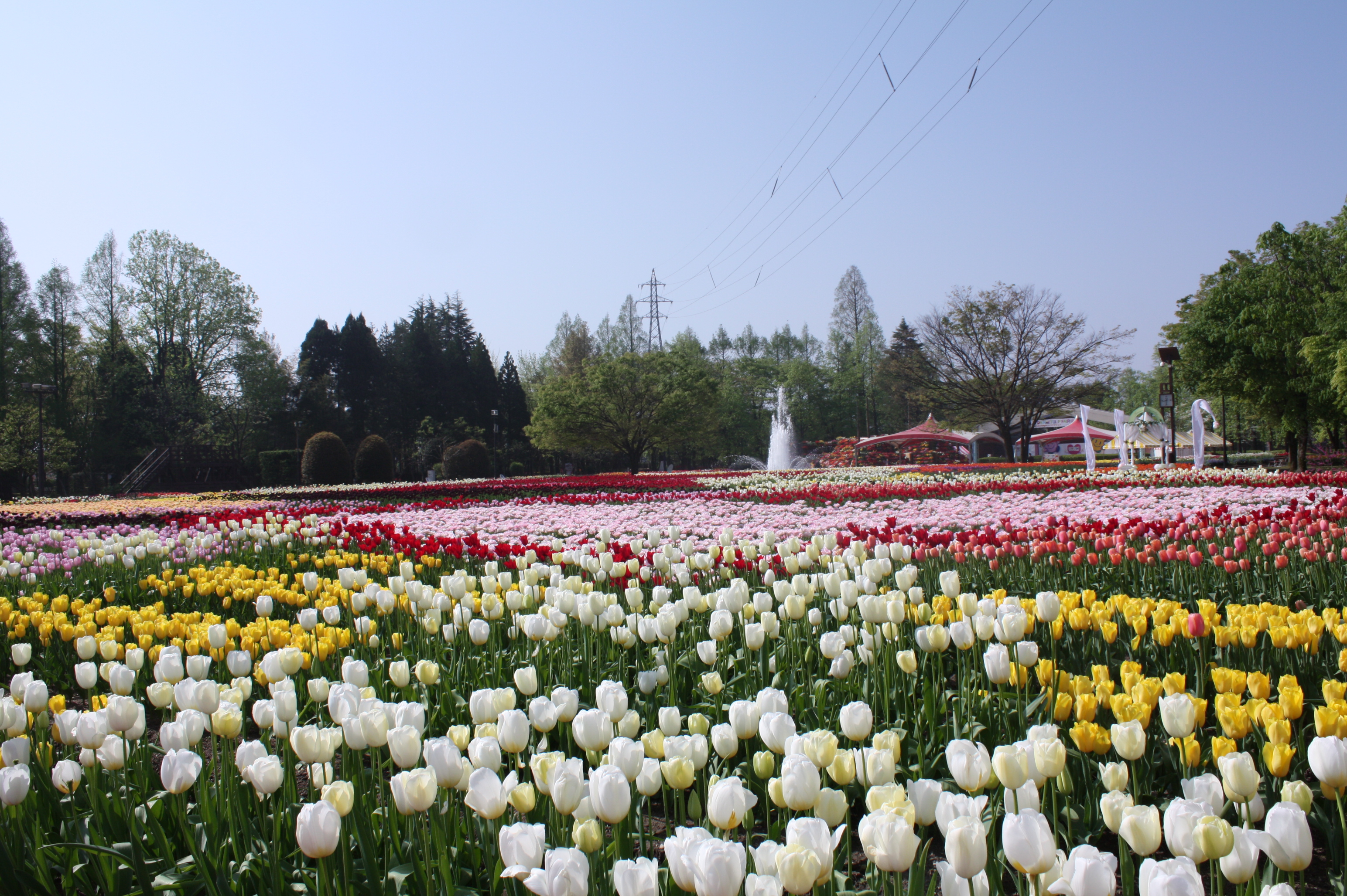 大花壇 (噴水)